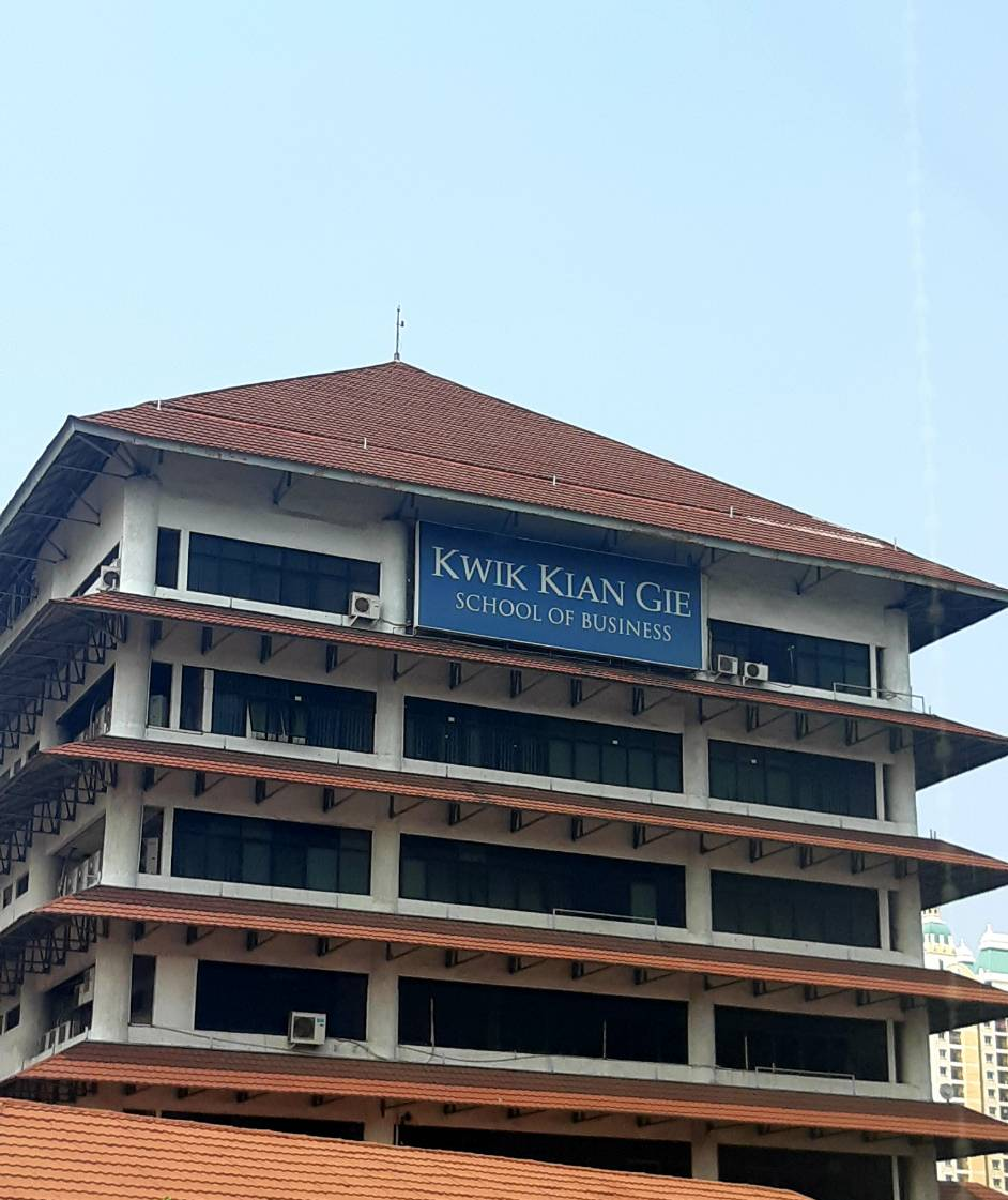 Tampak luar Kwik Kian Gie School of Business dari Altira Business Park